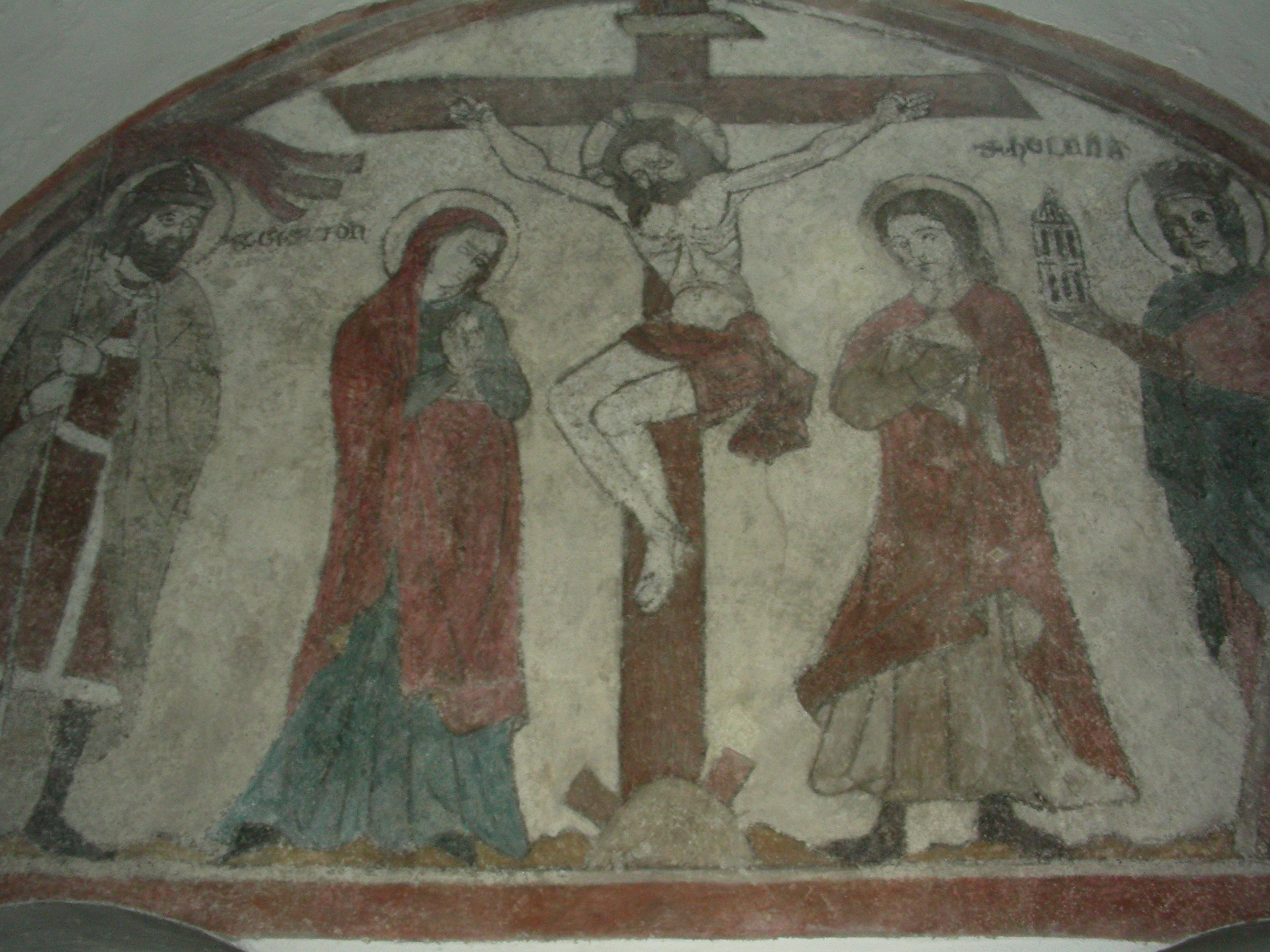 Kalkseccomalerei 13.Jhd.